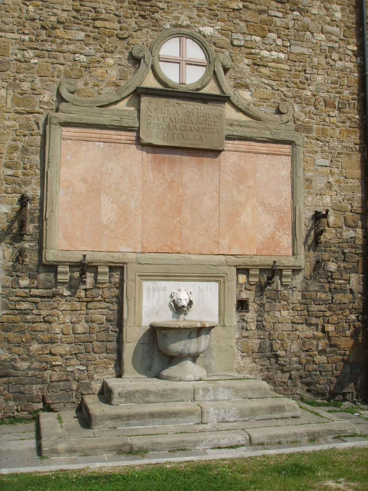 Porta santa croce a Firenze, fontana